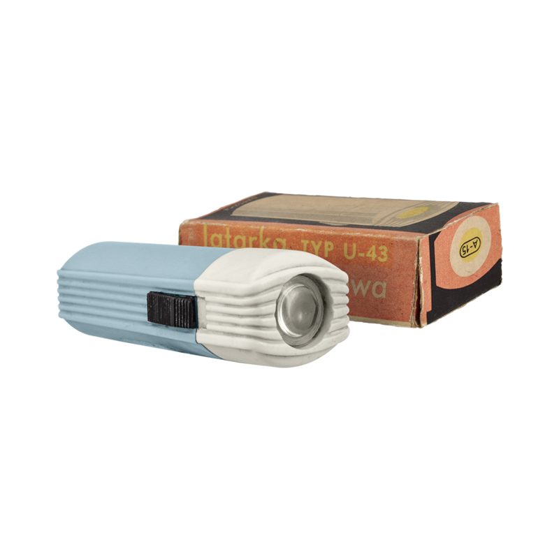 Latarka akumulatorowa U-43, 1975 rok. Ówczesna nazwa producenta: A-15.